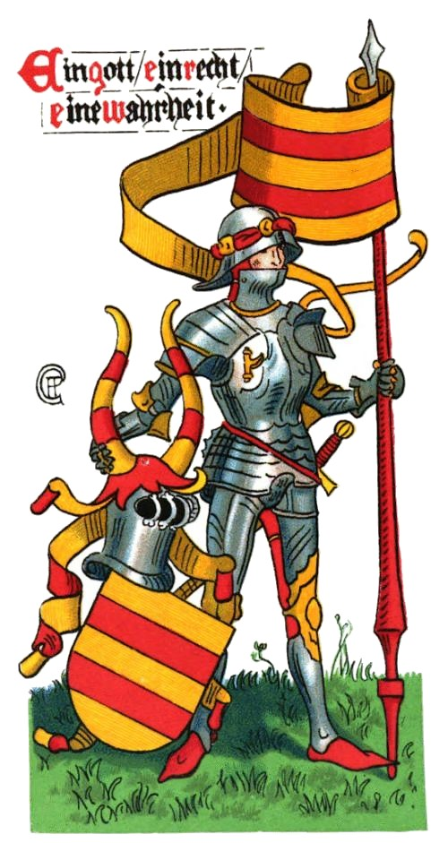 Wappen Oldenburg, aus einem Jahrgang des "Deutschen Wappenkalenders"